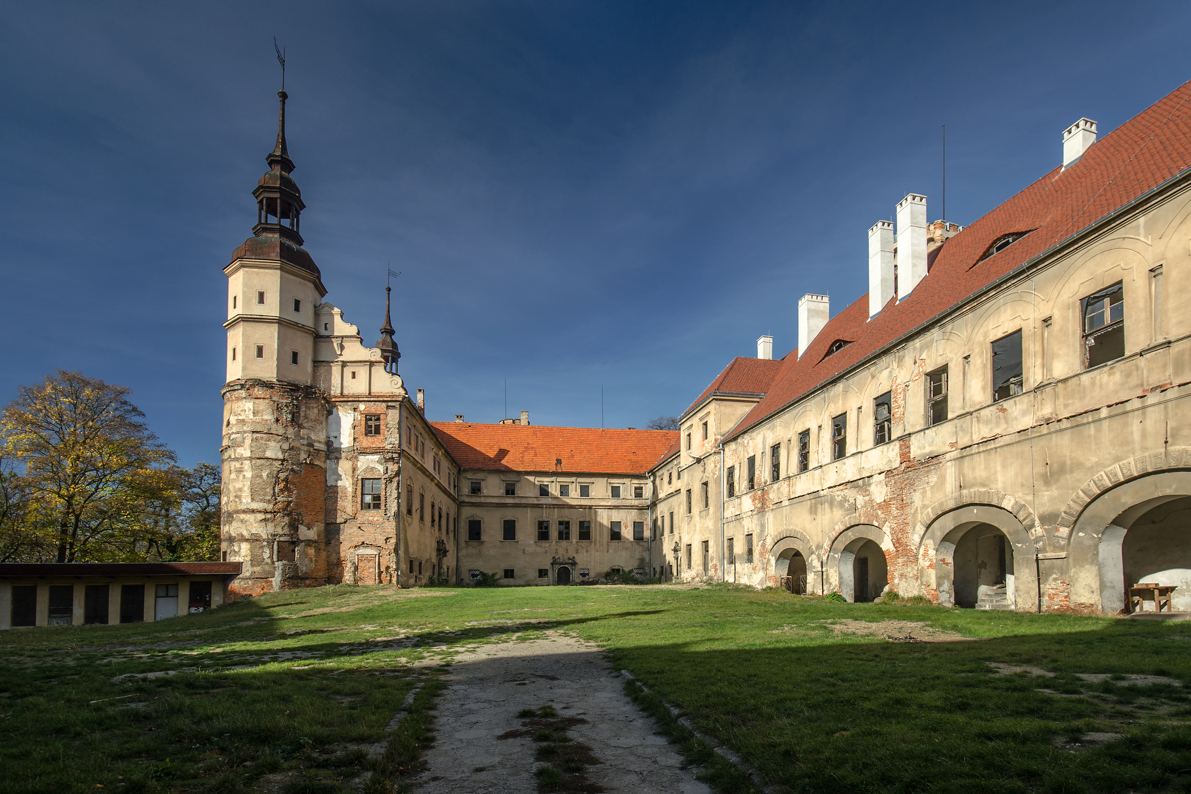 Głogówek, zamek górny i dolny, XVI, XIX w.